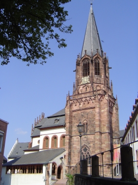 Stiftskirche St. Peter und Alexander in Aschaffenburg Foto: Digitalbild (größere Auflösung vorhanden)